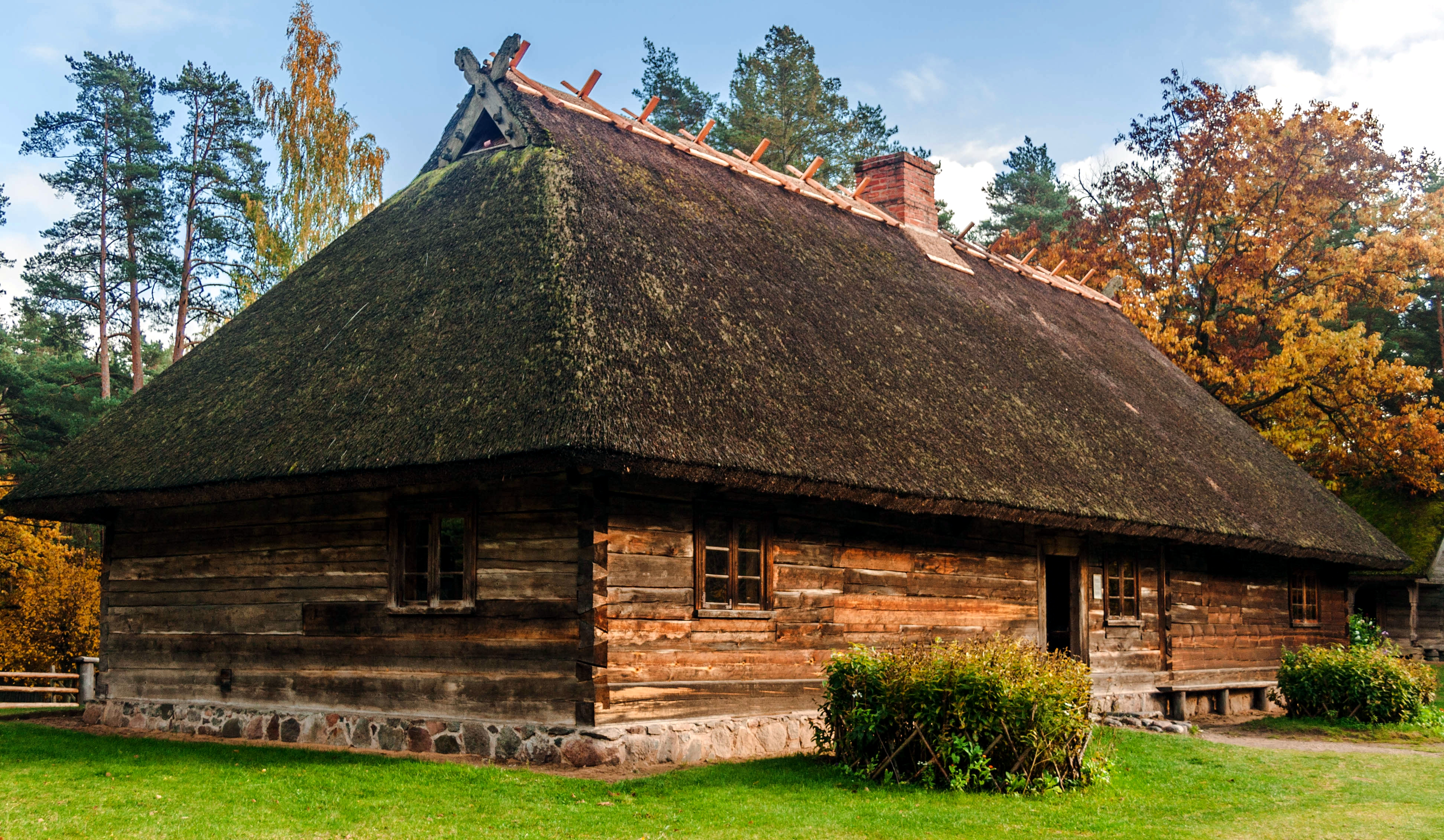 Latvijas Etnogrāfiskais brīvdabas muzejs, Vidzemes priekšpilsēta, Brīvības iela 440